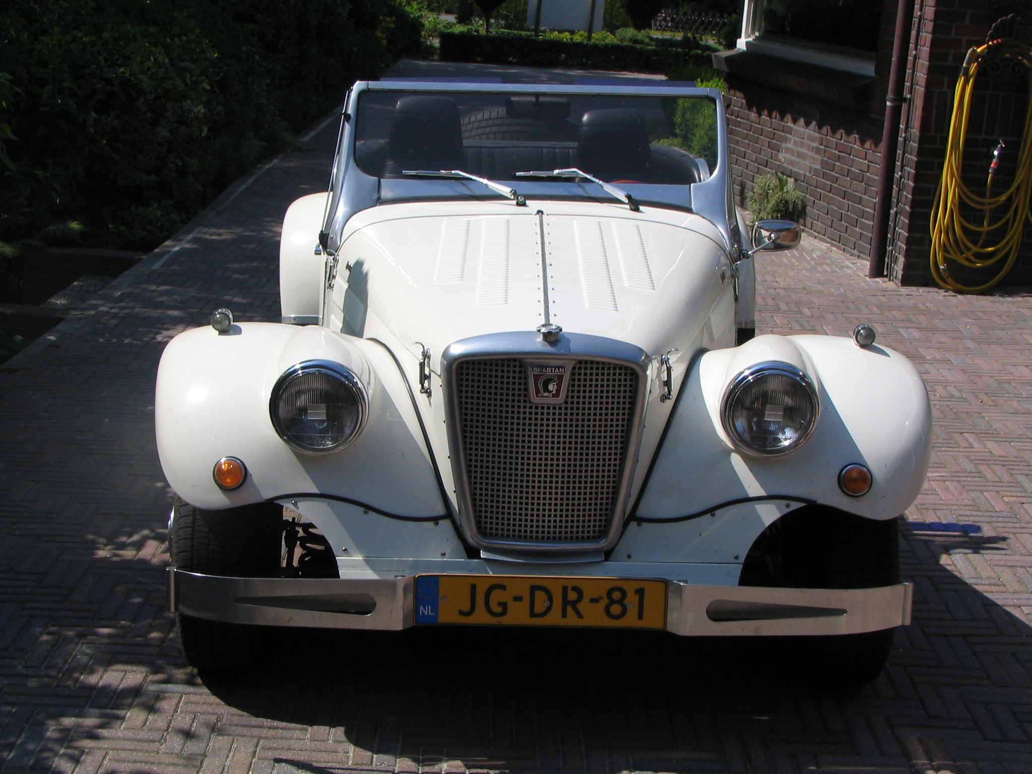 Spartan MK II